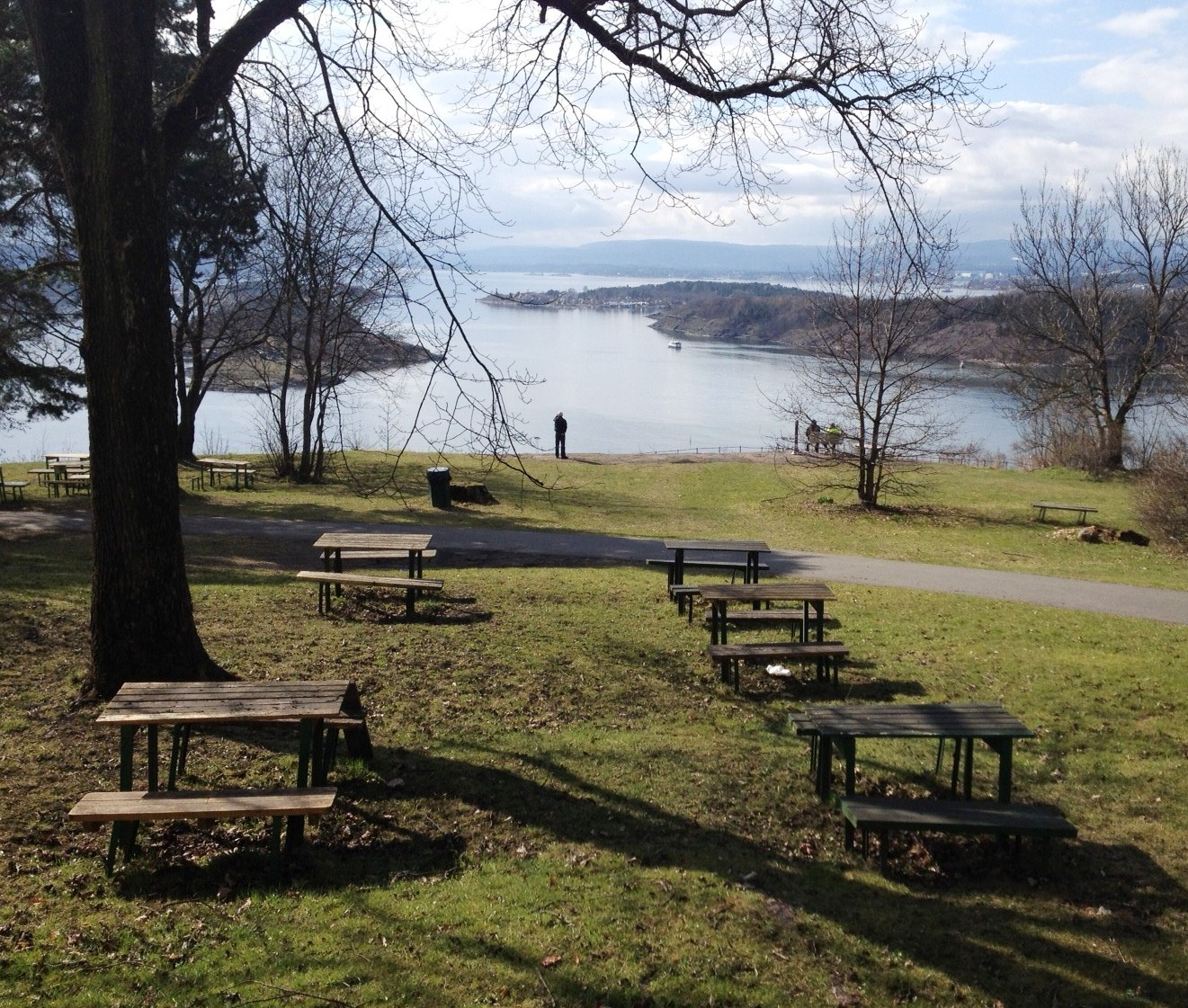 Cafe Utsikten, Ekeberg, oslo